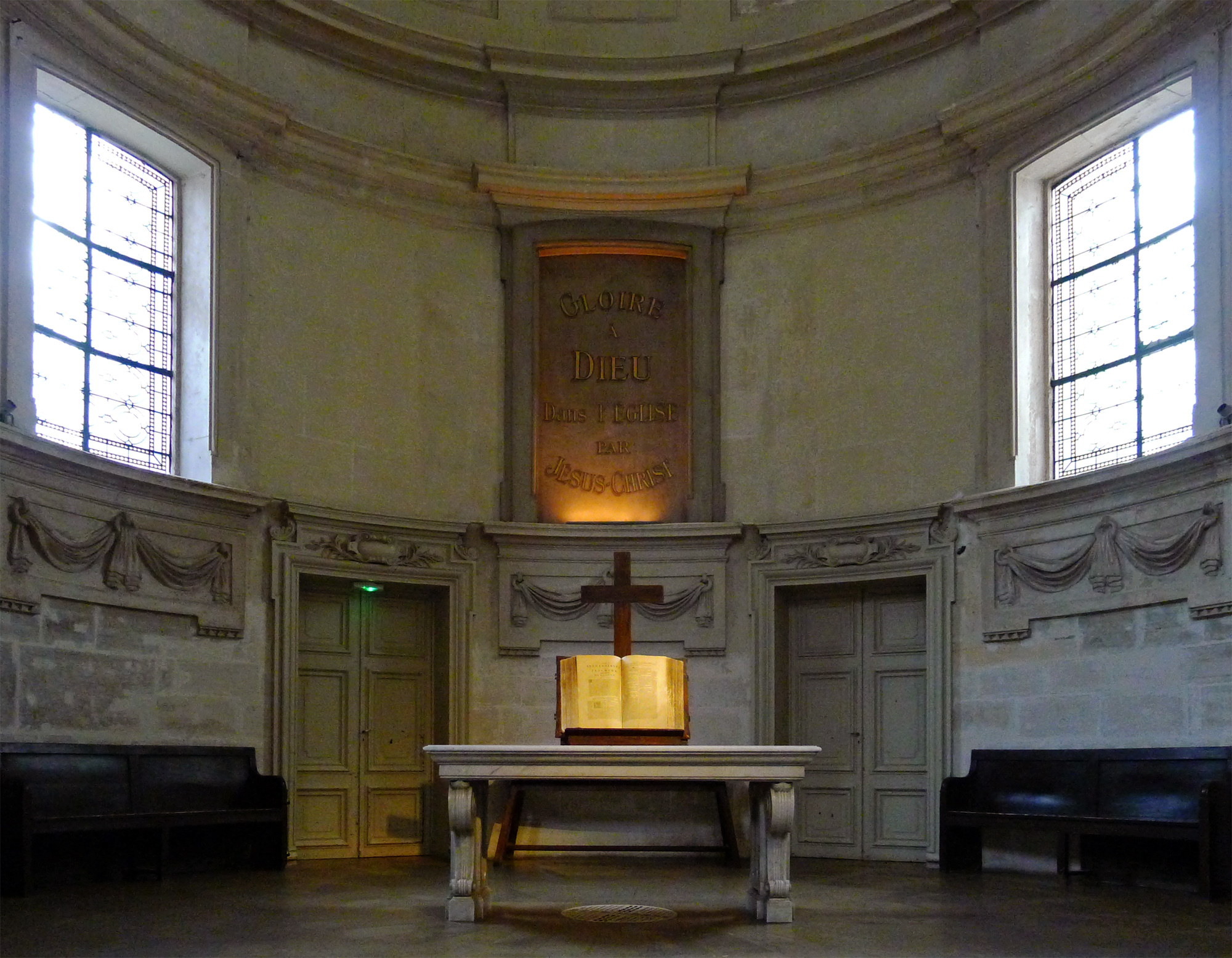 Temple du Marais situé rue Saint-Antoine (autel) - Paris IV